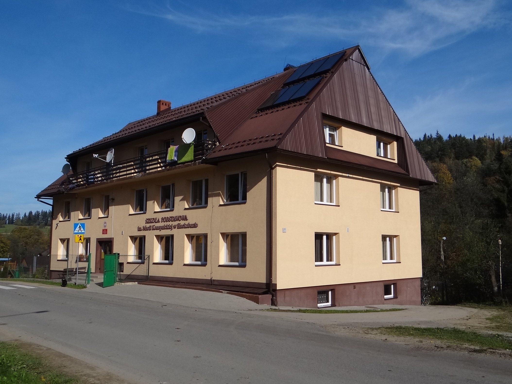 Harkabuz, Szkoła Podstawowa